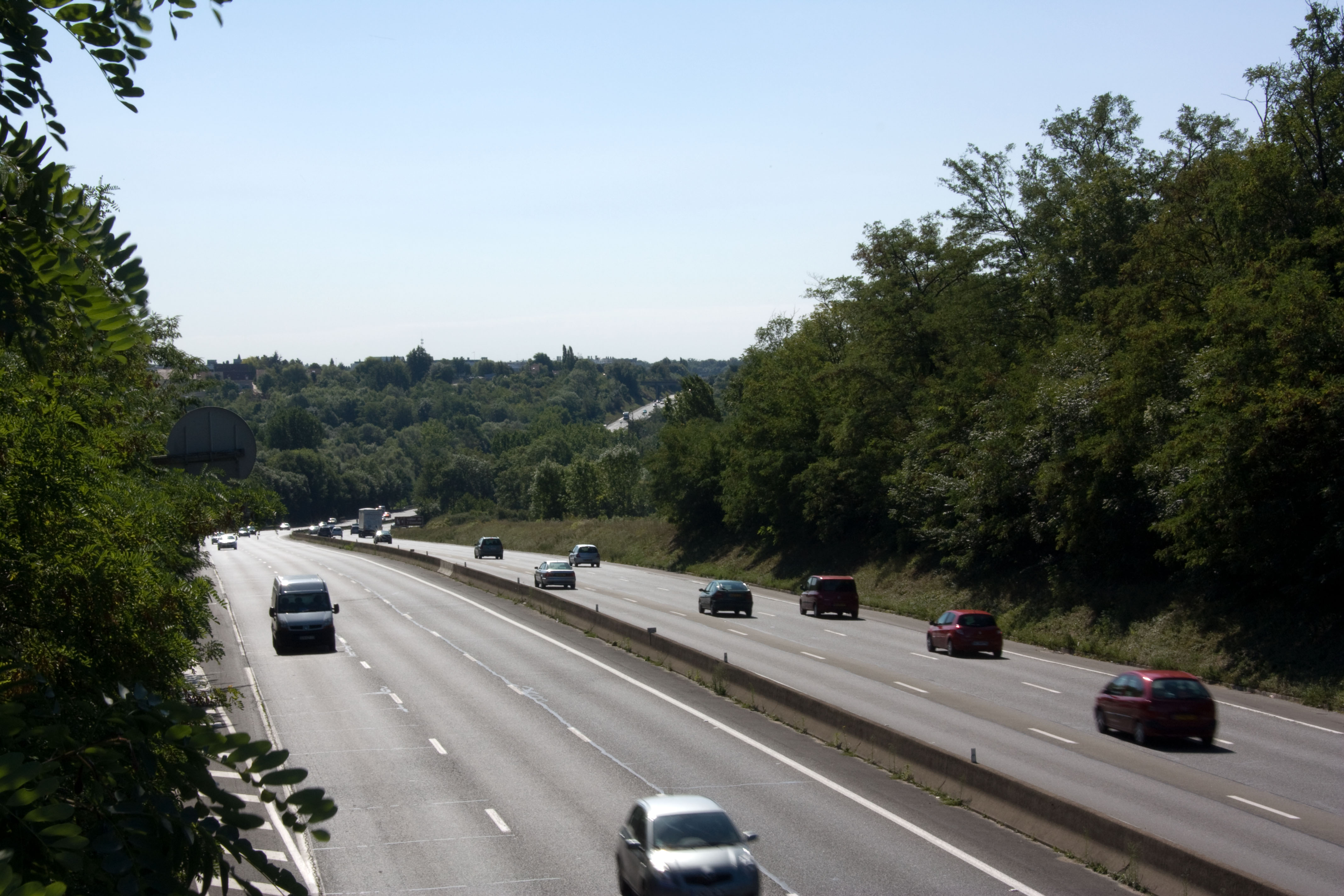 Autoroute A6 à Villabé, Villabé, Essonne, France